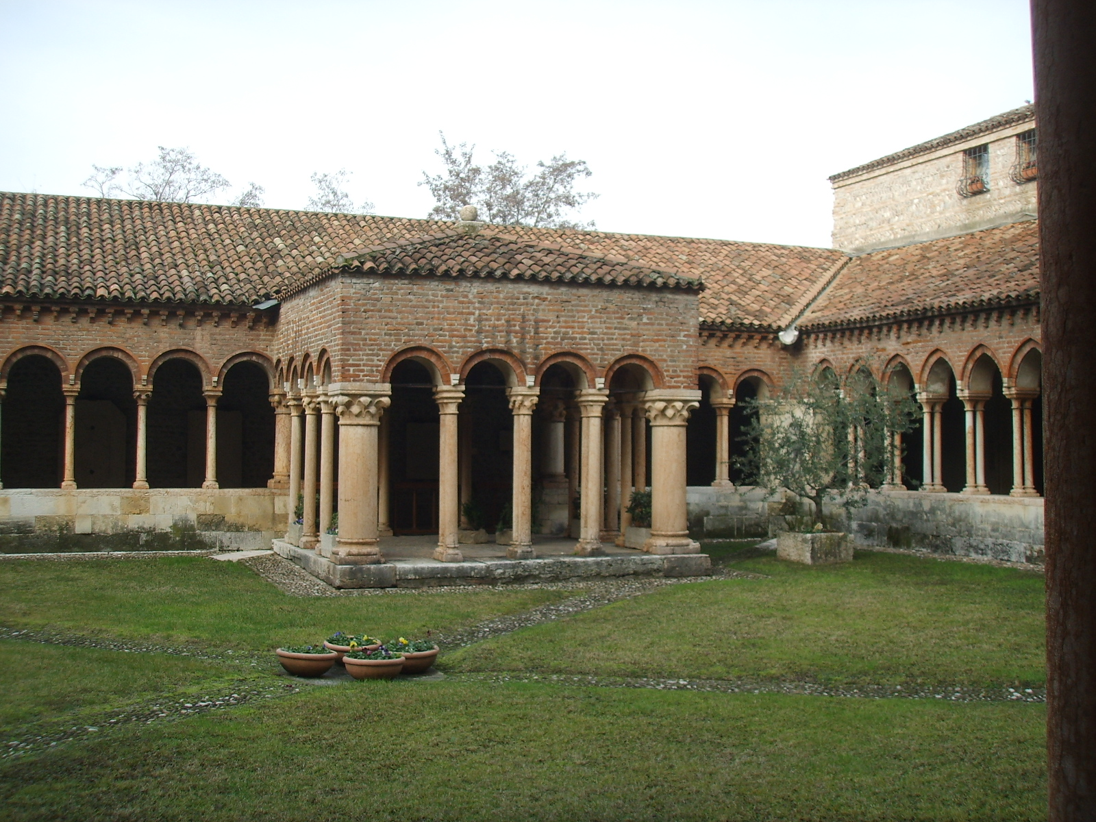 Basilica di san zeno, chiostro